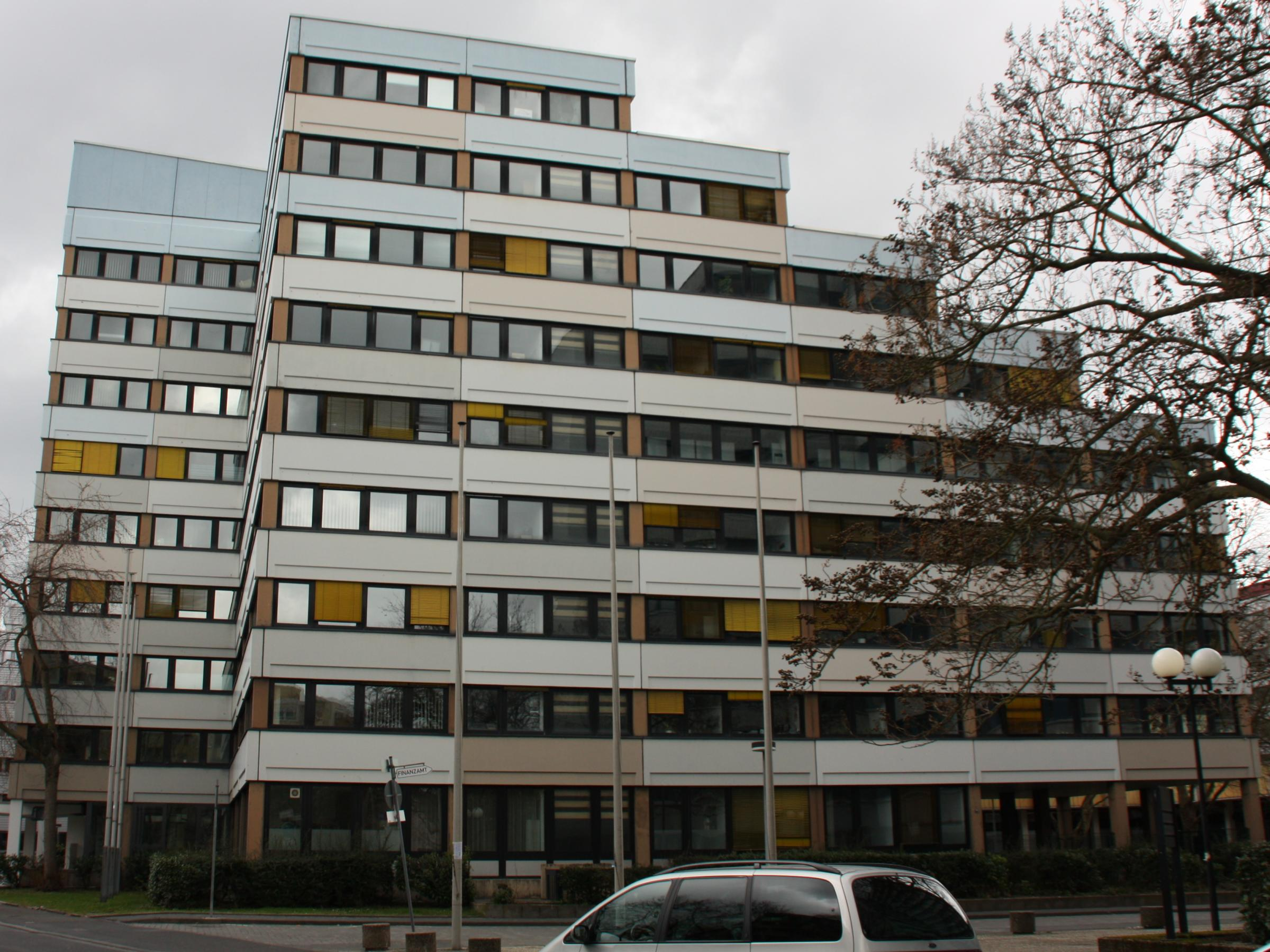 Das Gebäude des Hessischen Sozialministerium in Wiesbaden